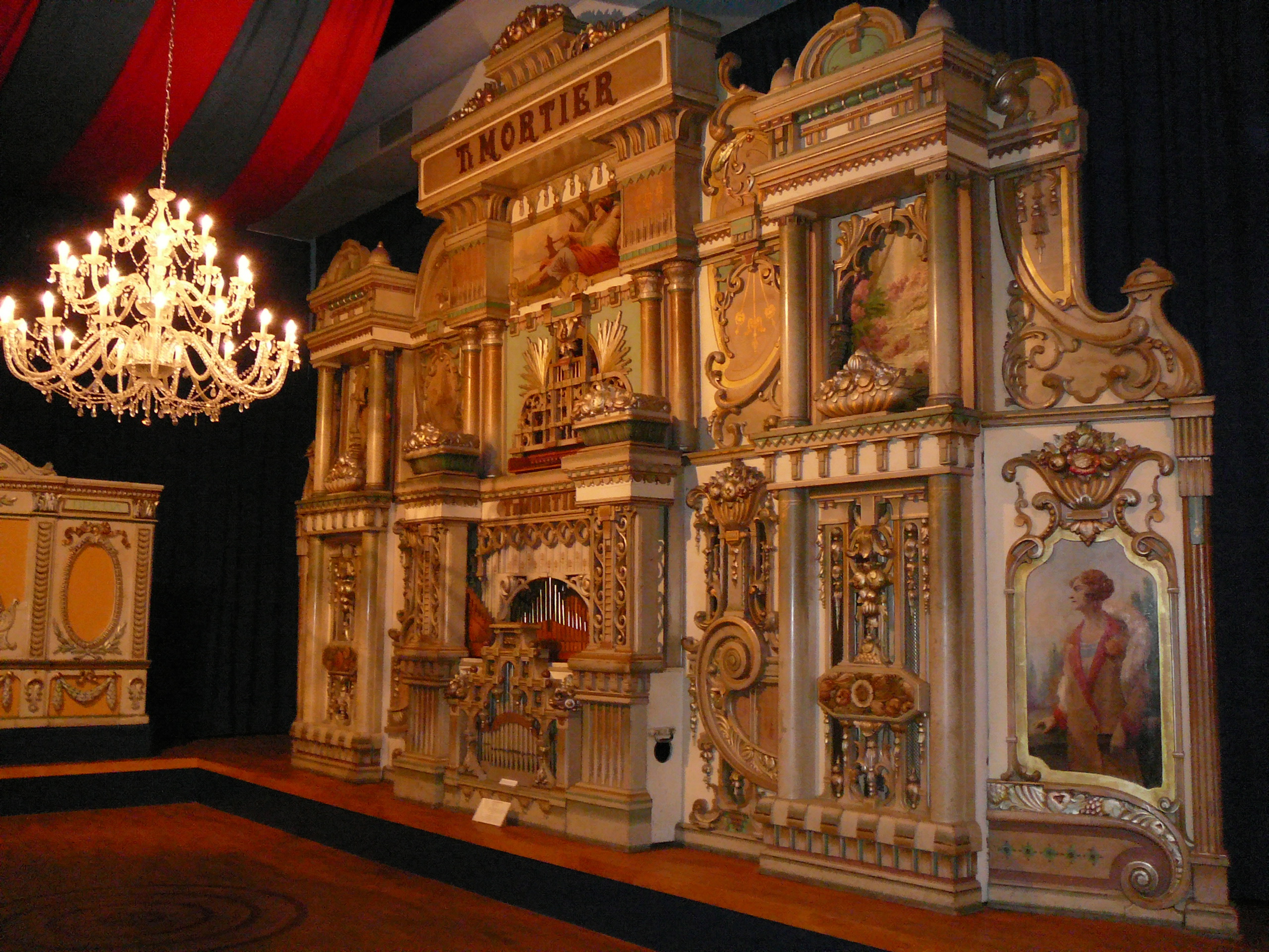 Dance organ "Mortier" (1927) by Th. Mortier museum van pierement tot speelklok (151)